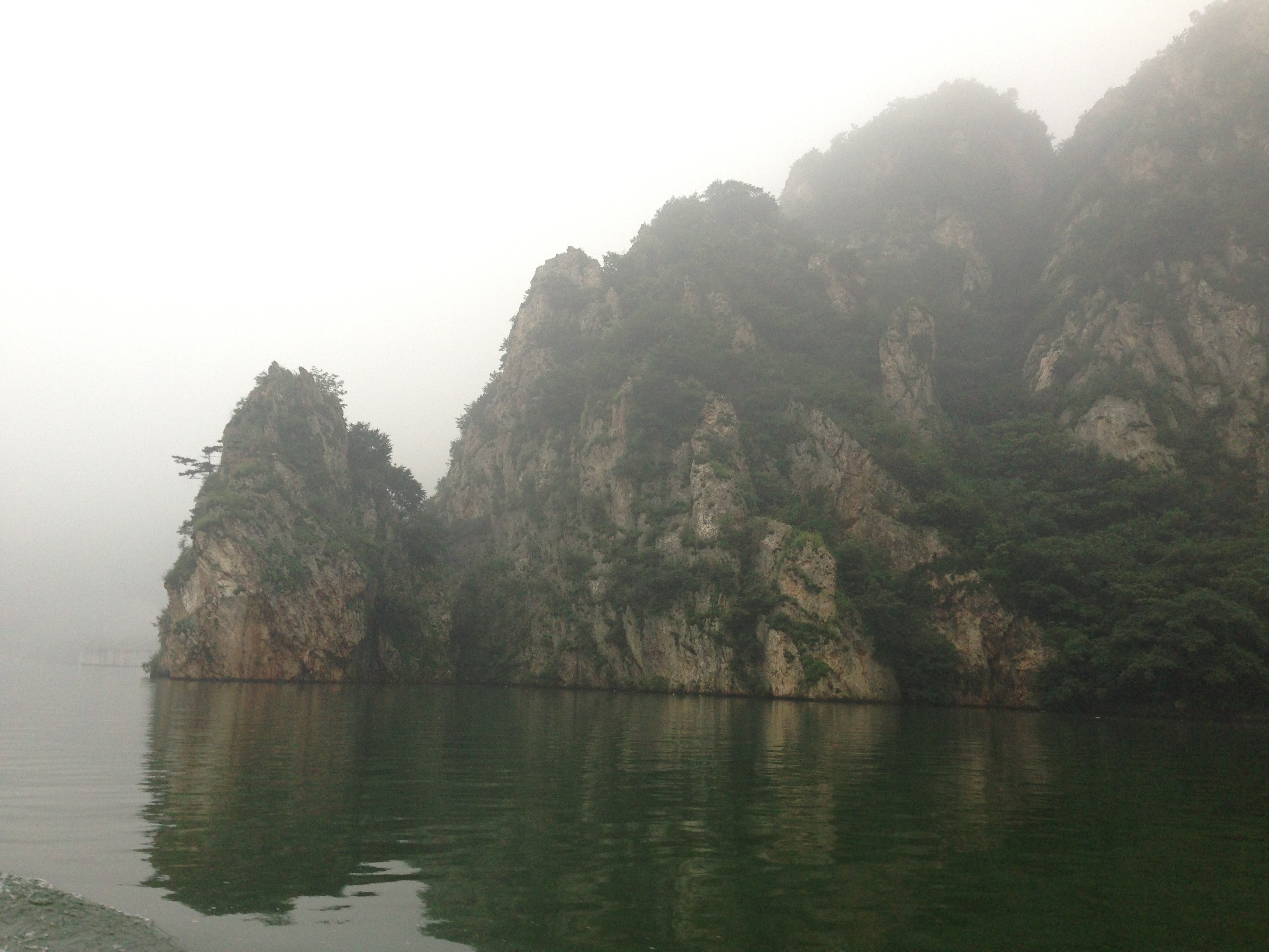 Zhuanghe, Dalian, Liaoning, China